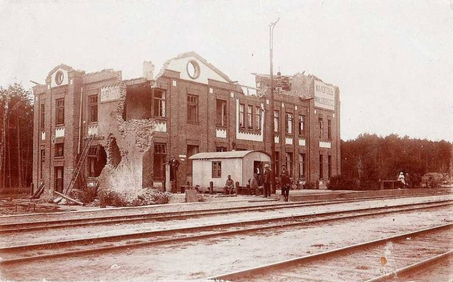 Dworzec kolejowy na Stacji Małogoszcz po ostrzale artyleryjskim w czasie I Wojny Światowej, widok od strony linii kolejowej.